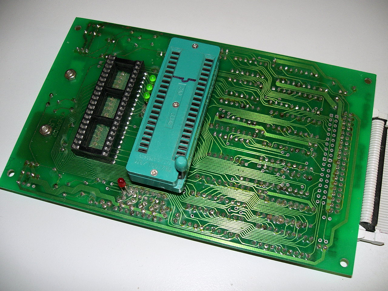 EPROP Eprom-Brenner ZIF Brennsockel